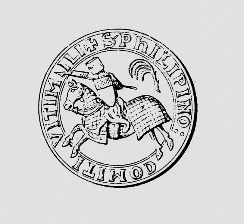 Stampa sigillo duecentesco di Filippino II conte di Ventimiglia e del Maro